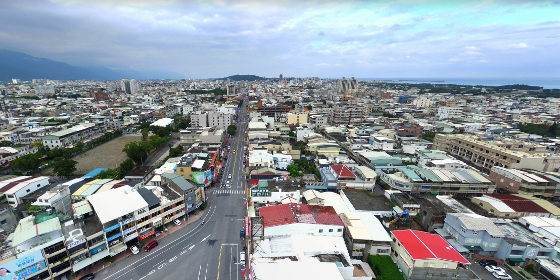 花蓮都會區天際線